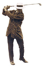 Harry Colt, golfcourse architect, Zoute Golf, België, in 1907